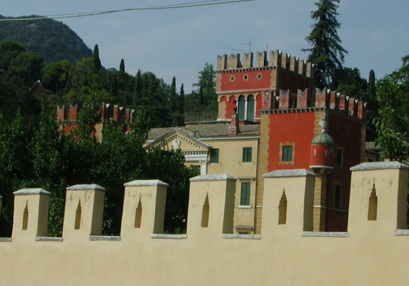 Villa degli Albertini in Garda Source: photo uploaded by User:RicciSpeziari. Photographer: Riccardo Speziari